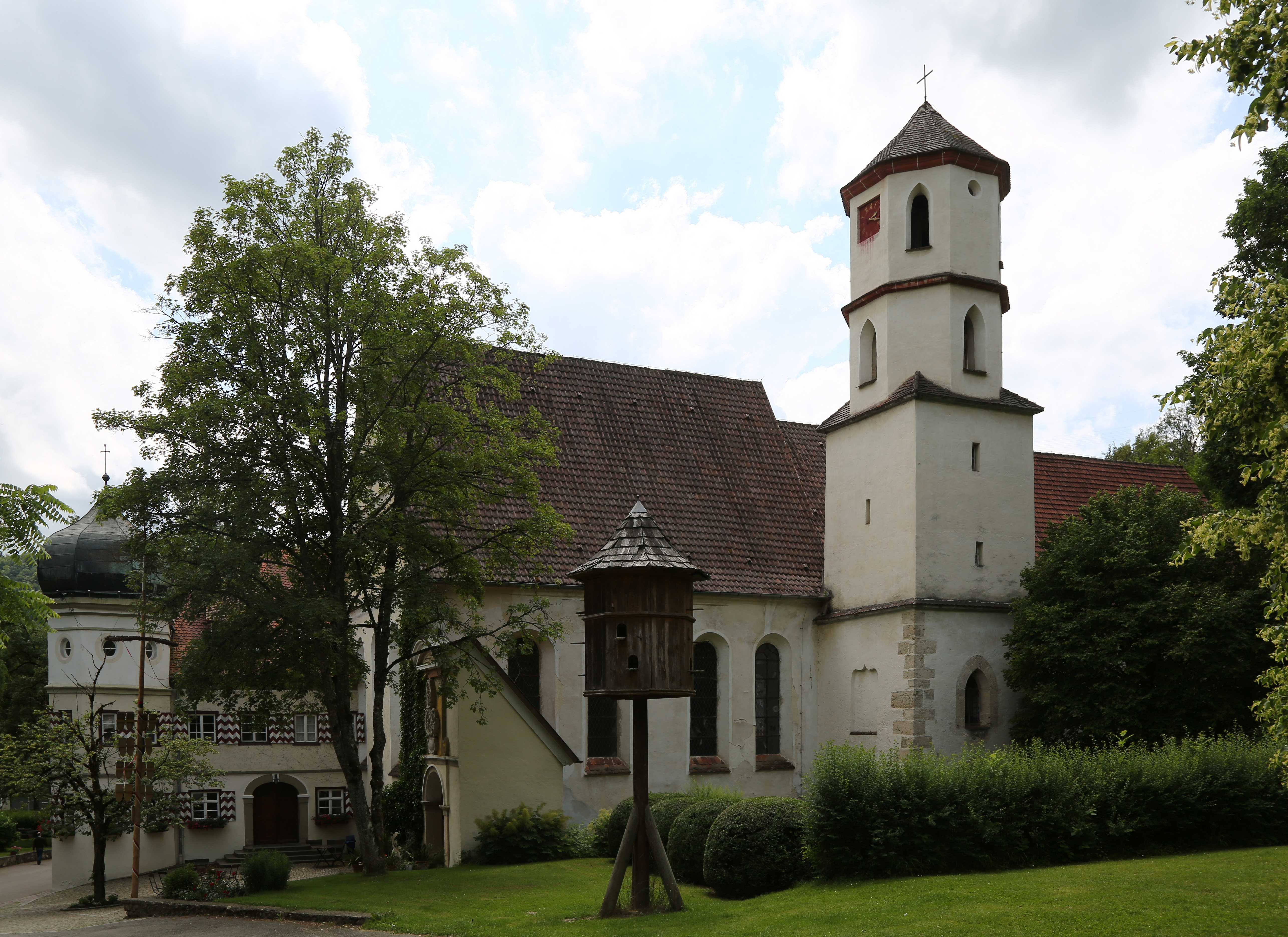 Kloster Urspring, Schelklingen. Das ursprüngliche Benediktinerinnen-Kloster von 1127 ist heute Sitz der Urspring-Schule.Die Klosterkirche St. Ulrich.